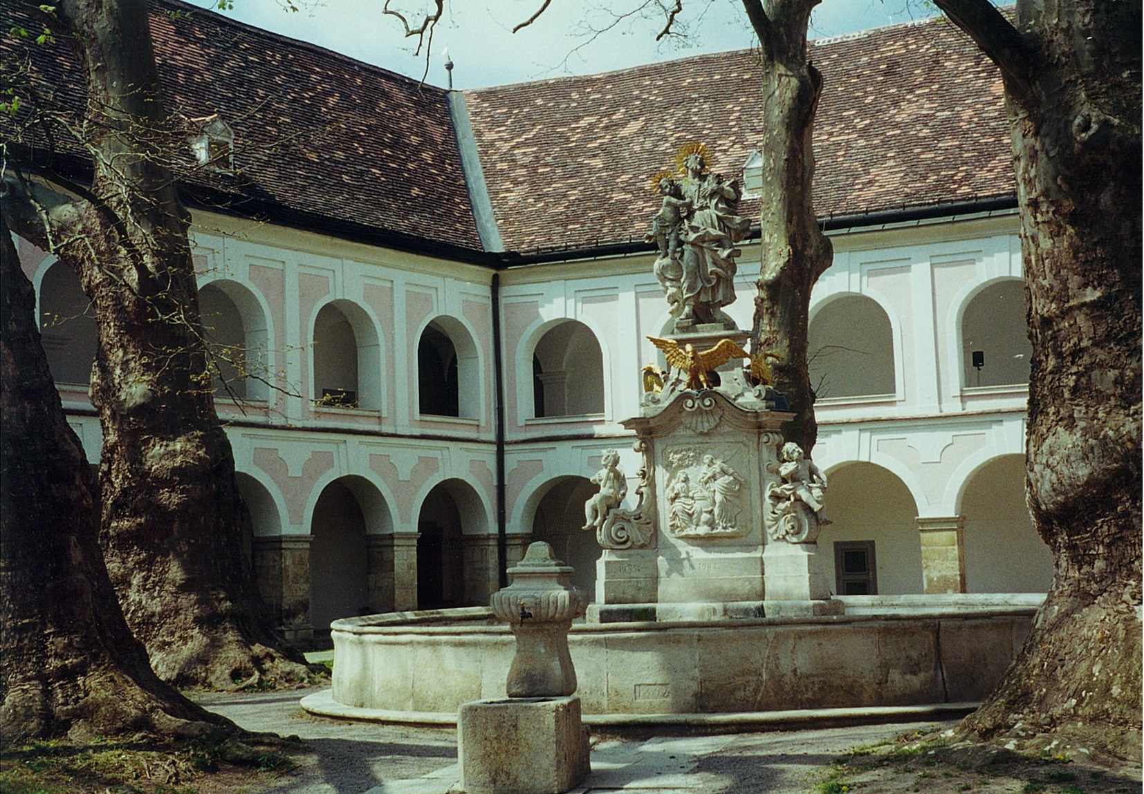 Heiligenkreuz Josephsbrunnen. Stift Heiligenkreuz.